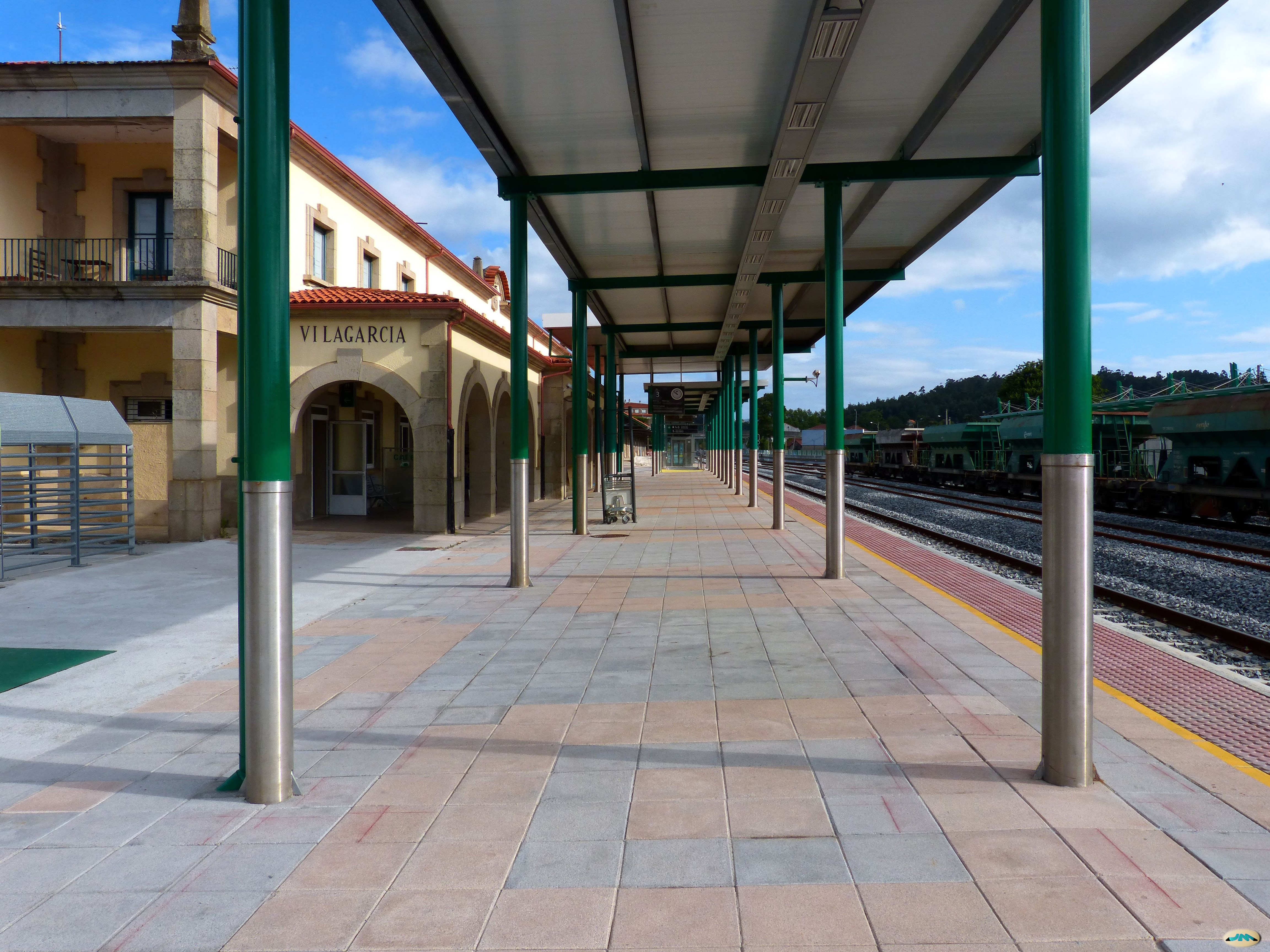 Estación de Vilagarcía